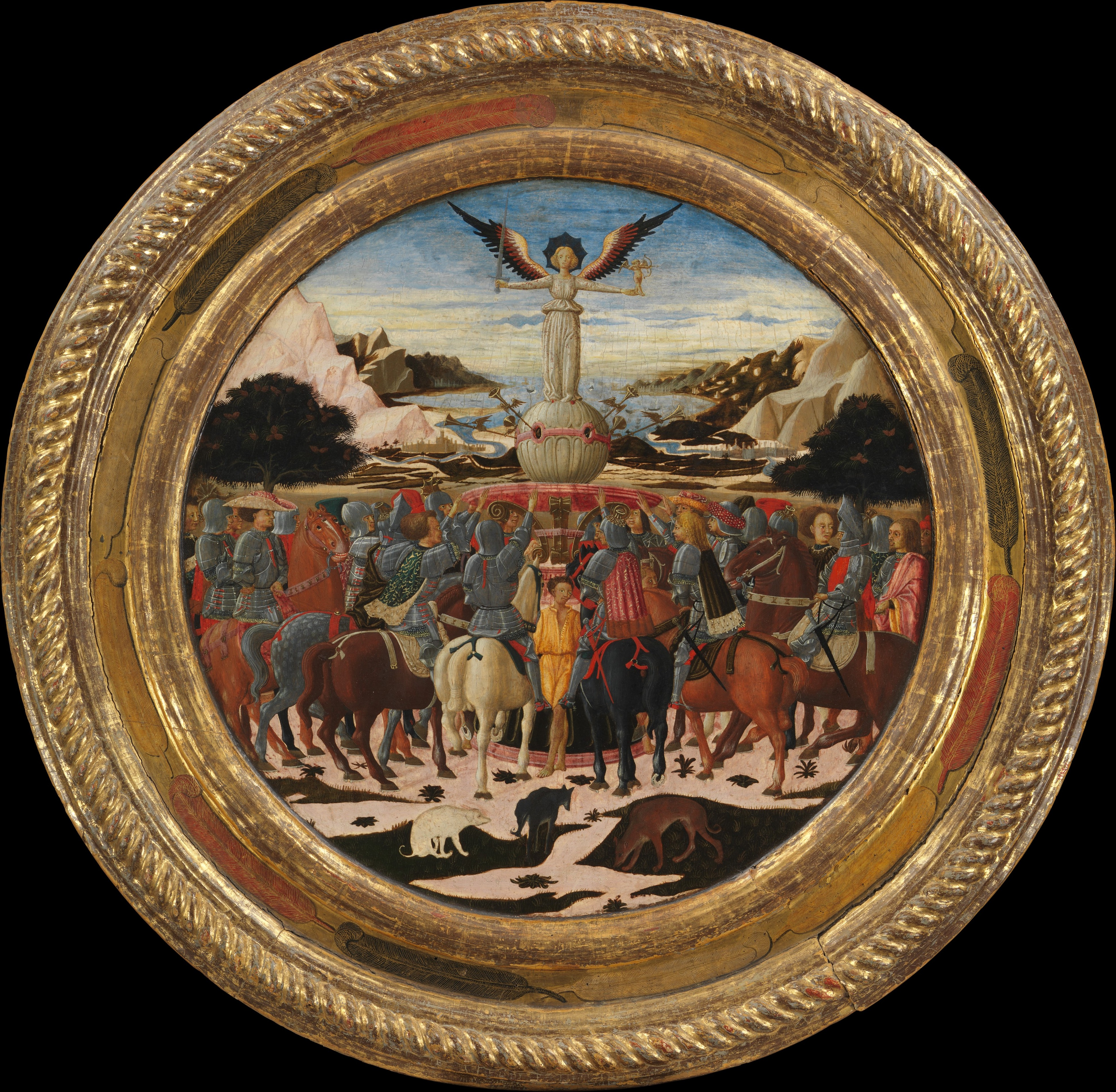 Painting, birth tray; Paintings